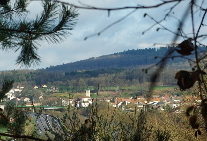 Vue d'Archettes depuis Arches